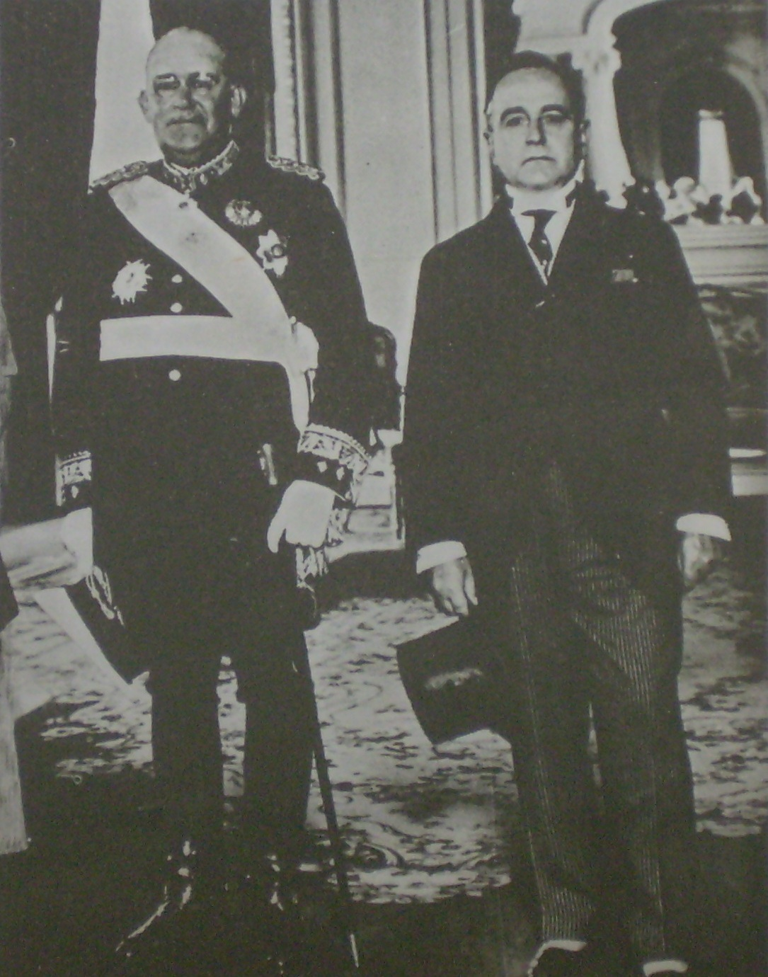 Agustín Pedro Justo (1876—1943) y Getulio vargas (presidente de Brasil)